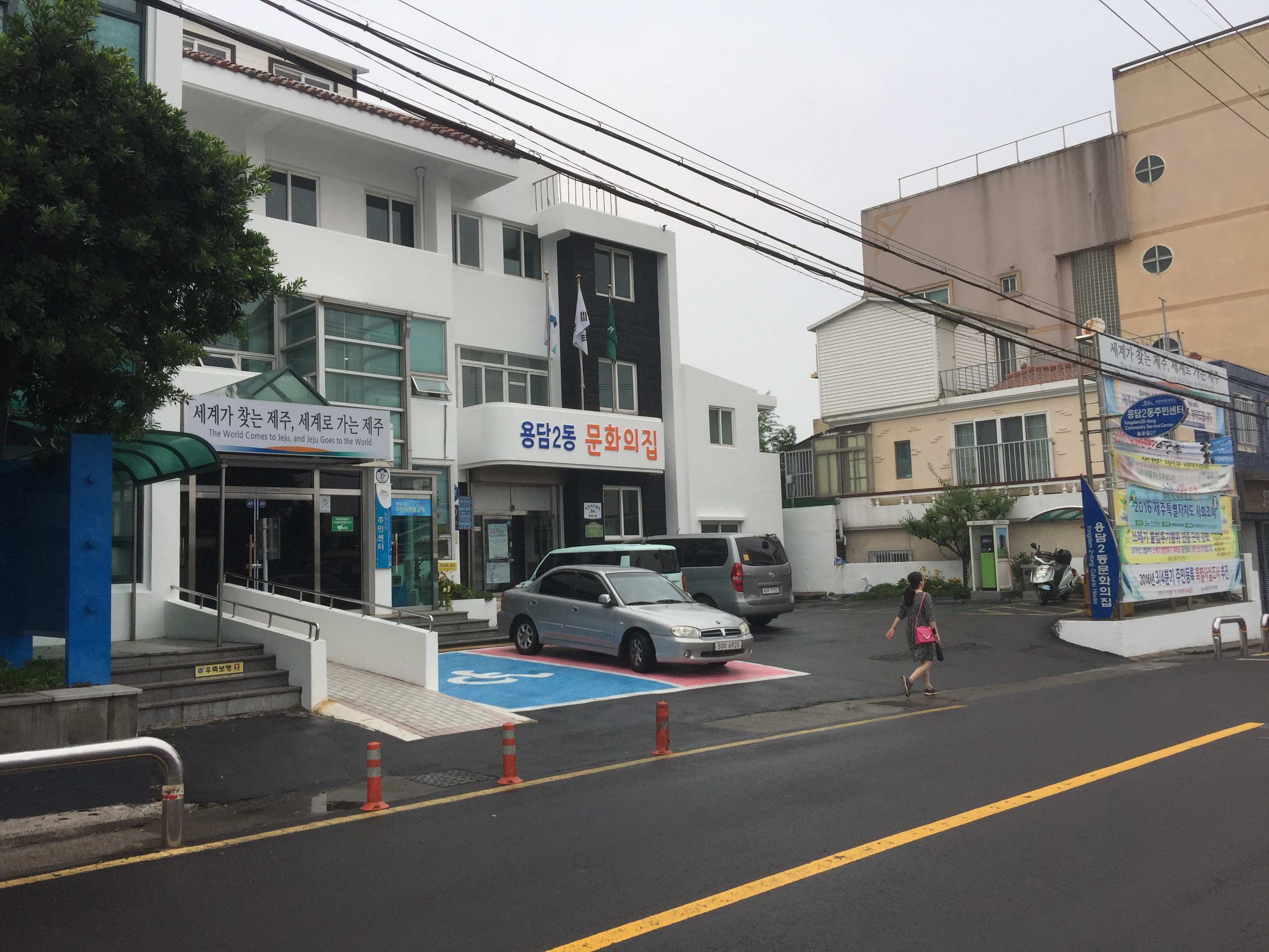 대한민국 제주특별자치도 제주시 용담2동 주민센터